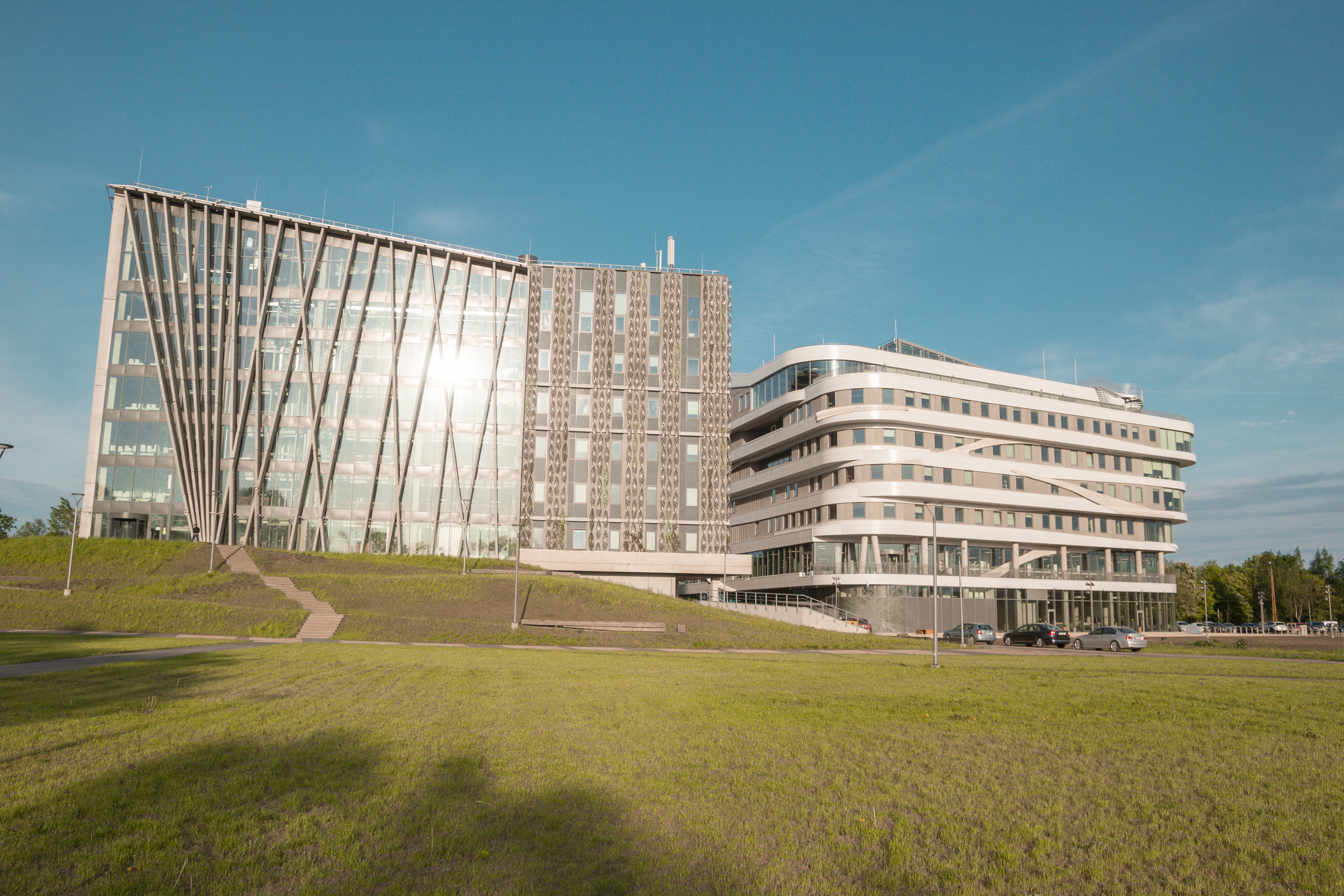 Zinātņu māja un Dabas māja